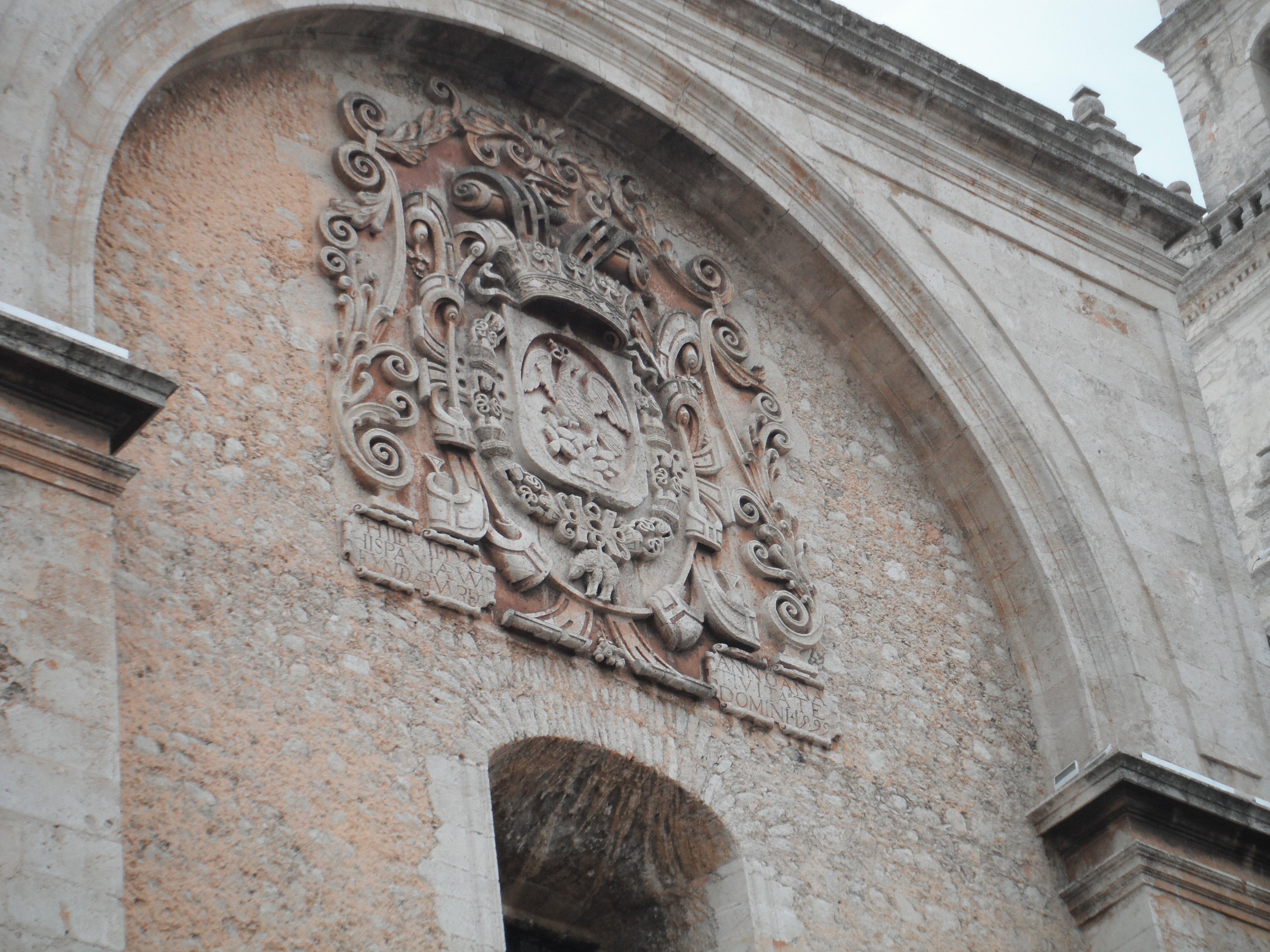 escudo de la catedral. S.XIX